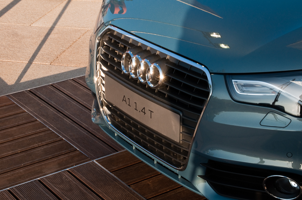 Calandre d'un Audi A1